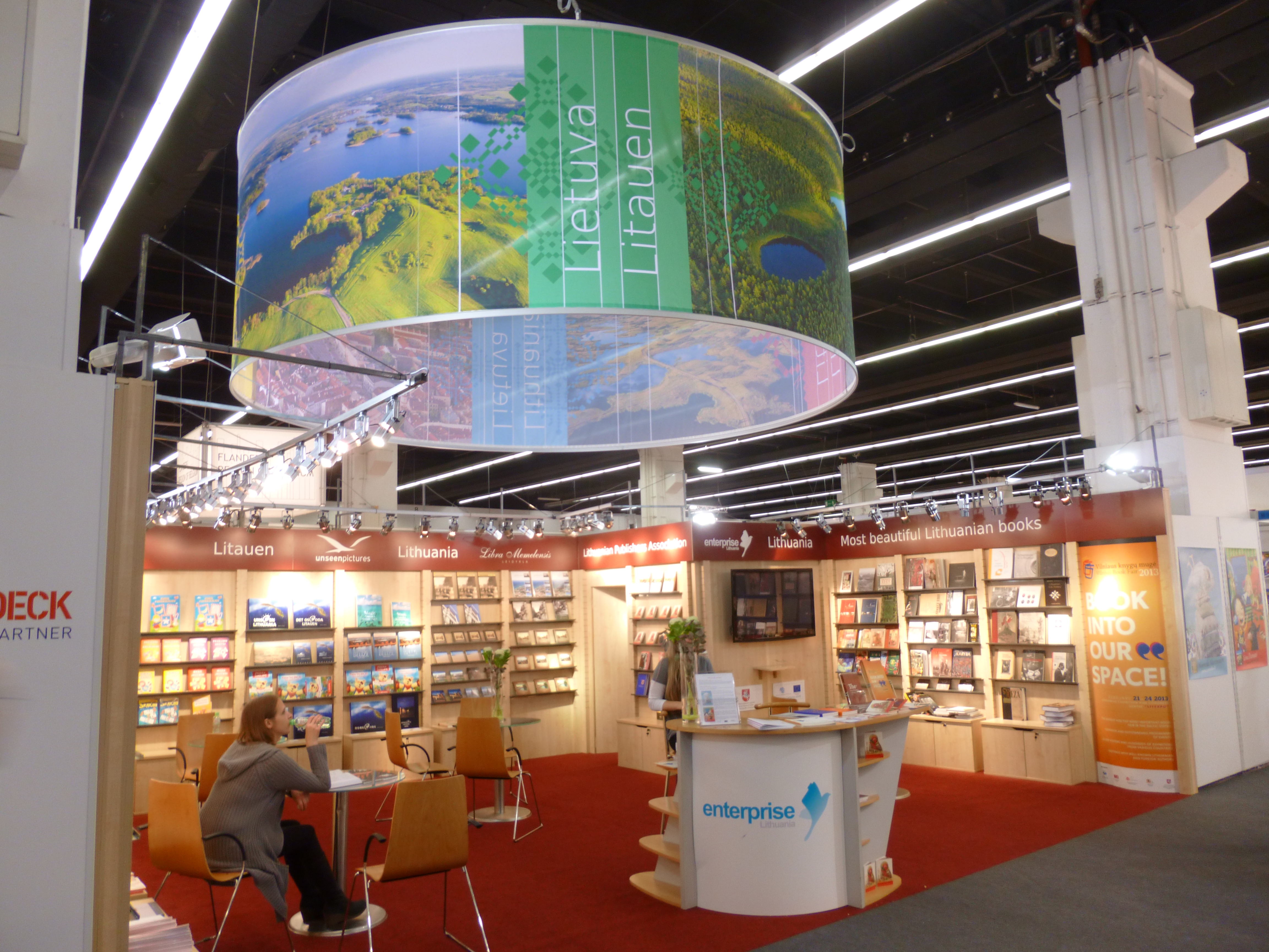 Komuna stando de la libroeldonejoj de Litovio en la Frankfurta librofoiro 2012